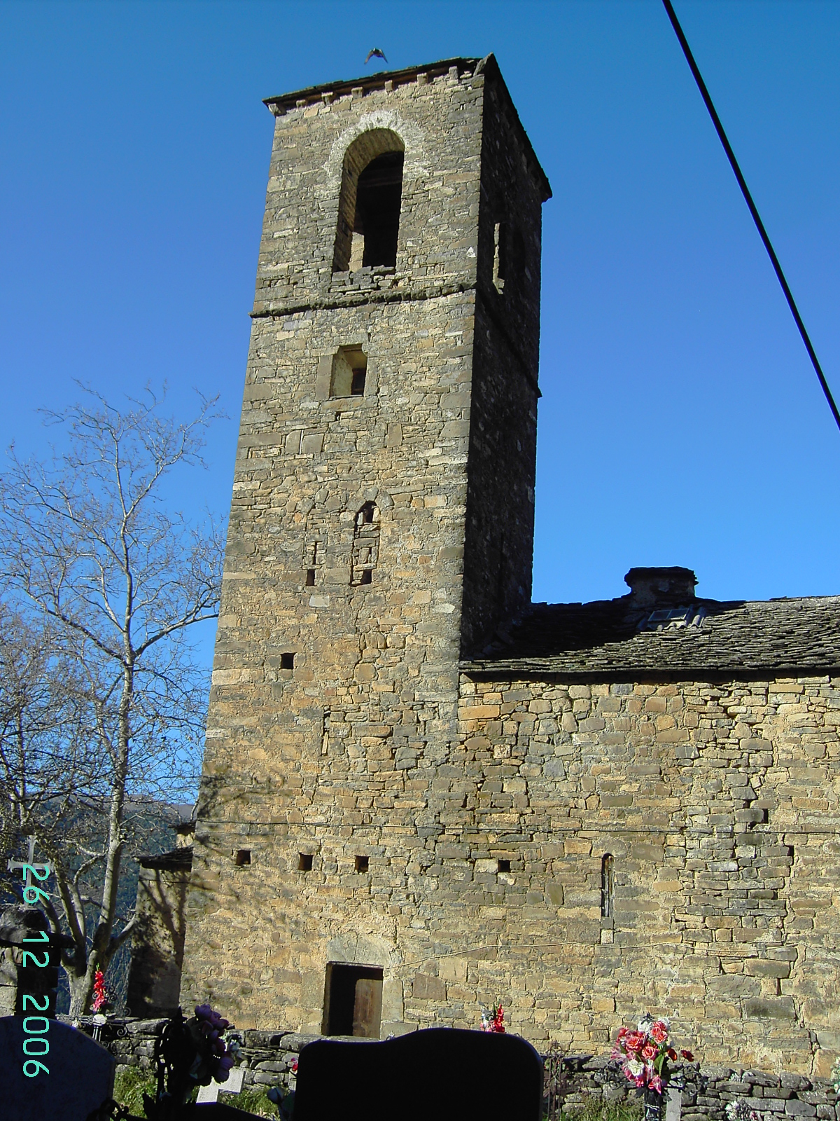 La iglesia de Buesa.